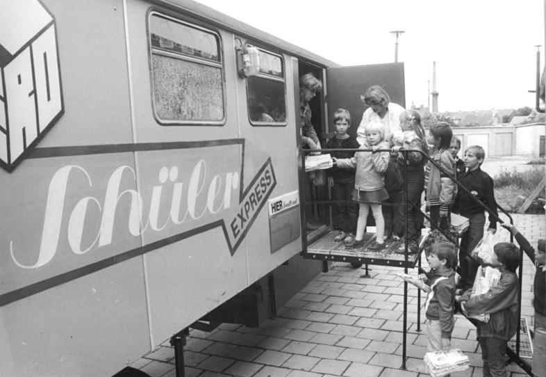 ADN-ZB-Bartocha-25.9.19865-hü-Bez. Neubrandenburg: Saro-Schülerexpress Seit Beginn des Schuljahres ist im wöchentlichen Wechsel der Sero-Schülerexpress in den acht Schulen der Kreisstadt Waren unterwegs. Flaschen, Gläser und Altpapier werden von Lehrern und Schülern gesammelt und für den Transport zum VEB Sekundärrohstofferfassung Neubrandenburg vorbereitet.